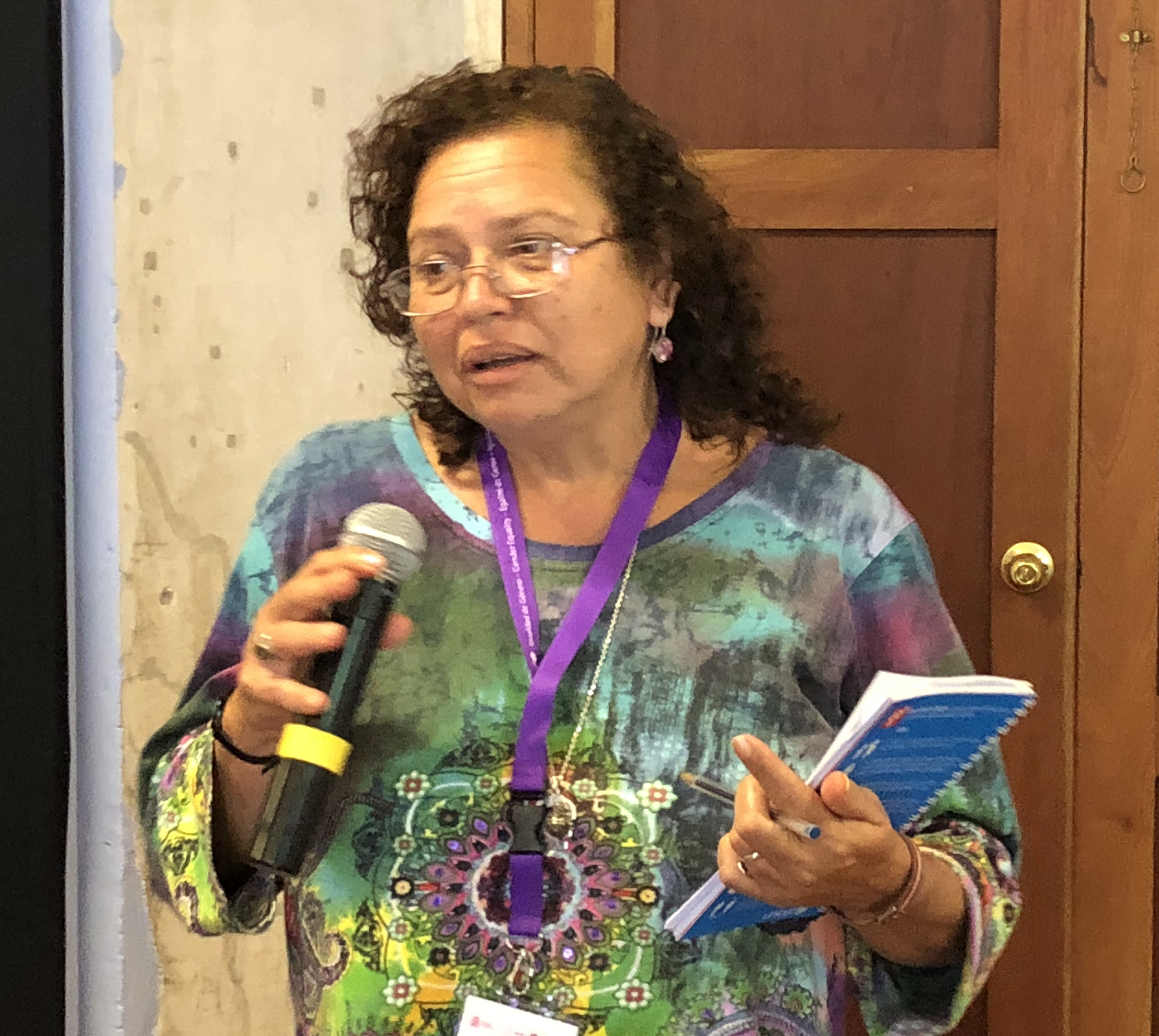 Reunión de UNICEF Guatemala